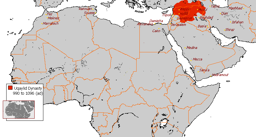 Uqaylid Dynasty 990-1096 (AD)